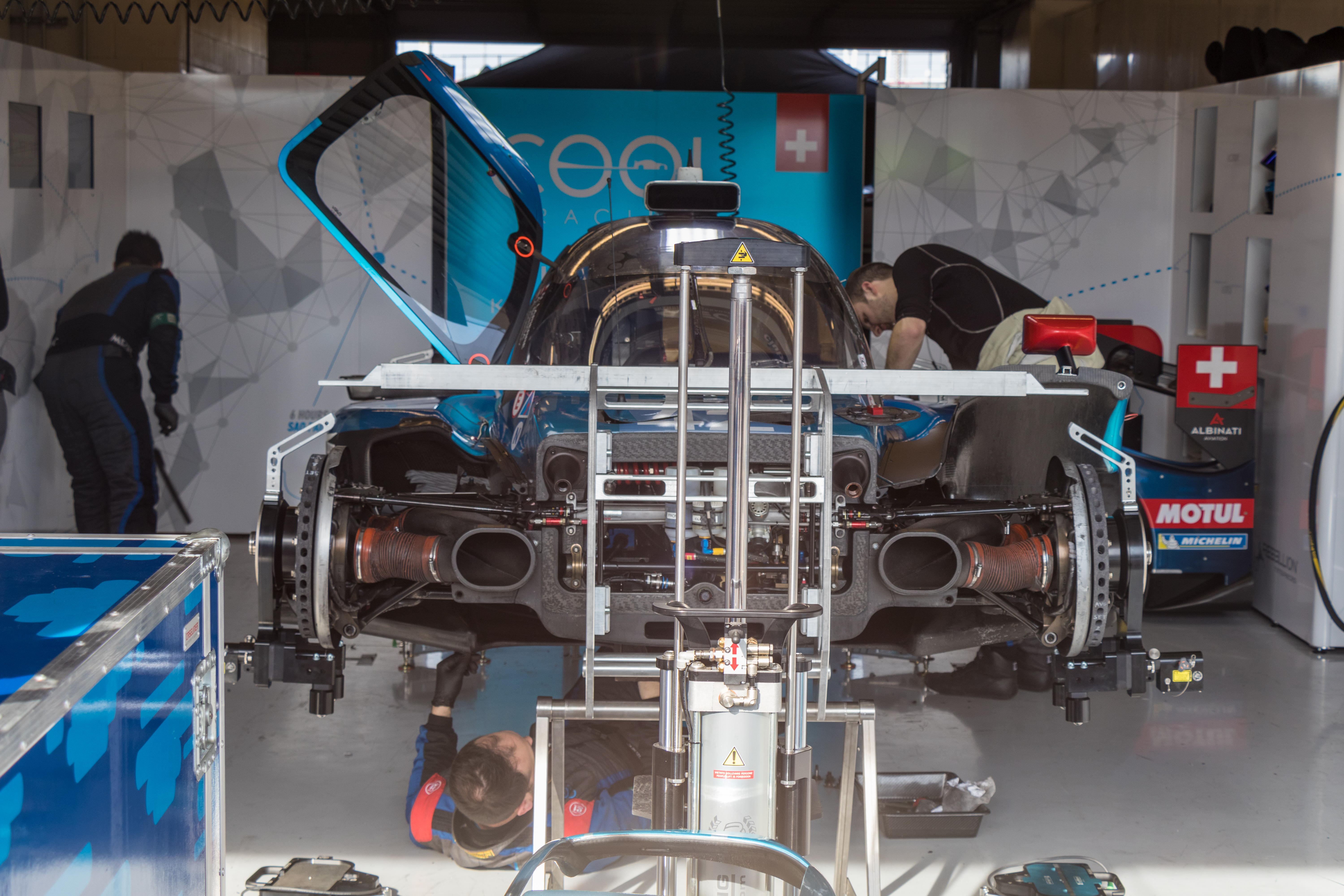 L'Oreca 07 de l'écurie Cool Racing pilotée par Antonin Borga, Alexander Coigny et Nicolas Lapierre lors des Lone Star Le Mans 2020